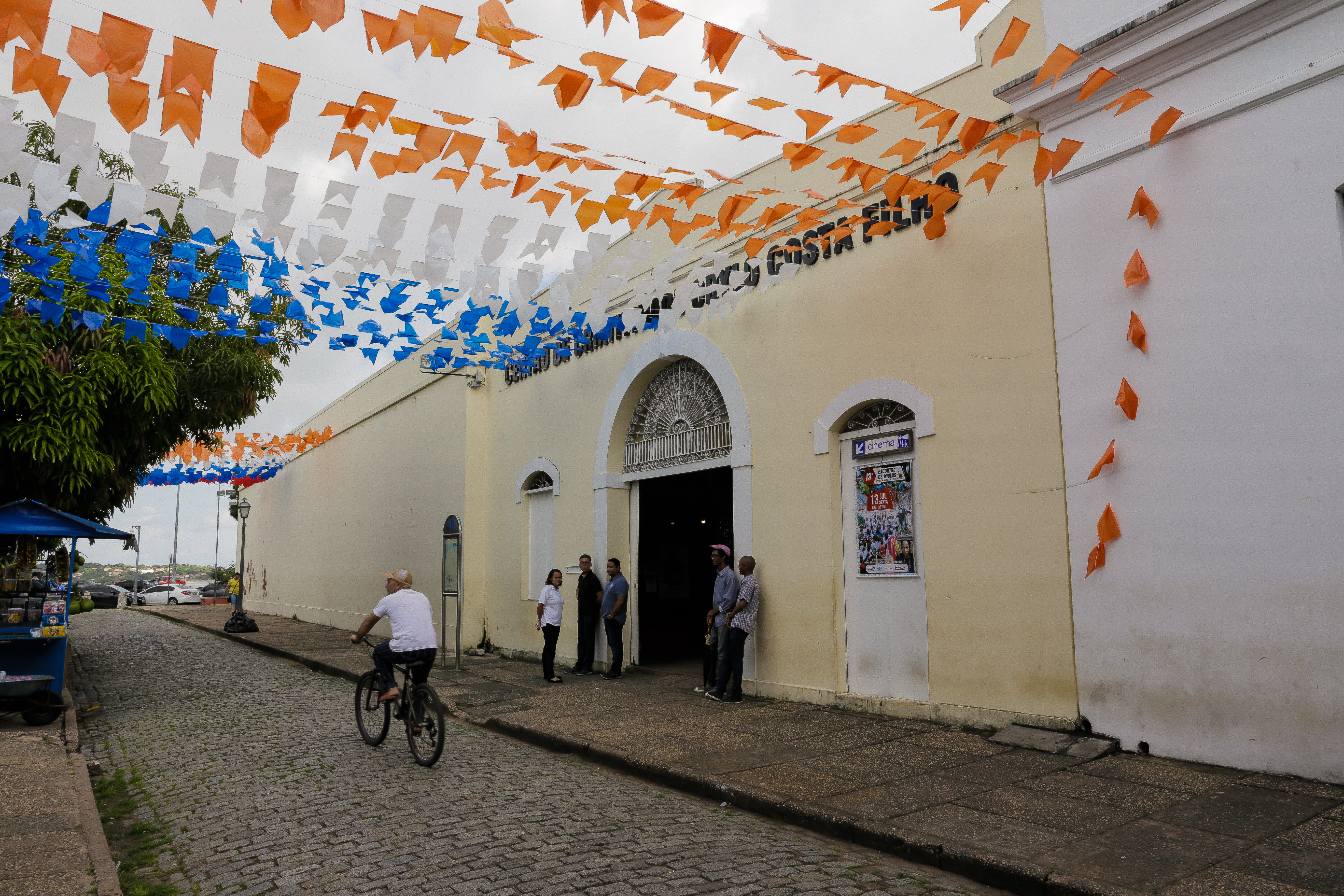 O Ministério da Cultura (MinC) promoveu nesta quinta-feira (5/07), em São Luís, mais uma edição do Circuito #CulturaGeraFuturo, que tem por objetivo ampliar o alcance da política cultural e dos instrumentos de fomento à cultura do Governo Federal. O encontro na capital maranhense foi a 21ª edição do evento, que percorrerá todas as capitais brasileiras até o final de julho. 05.07.2018 Fotos: Clara Angeleas/MinC